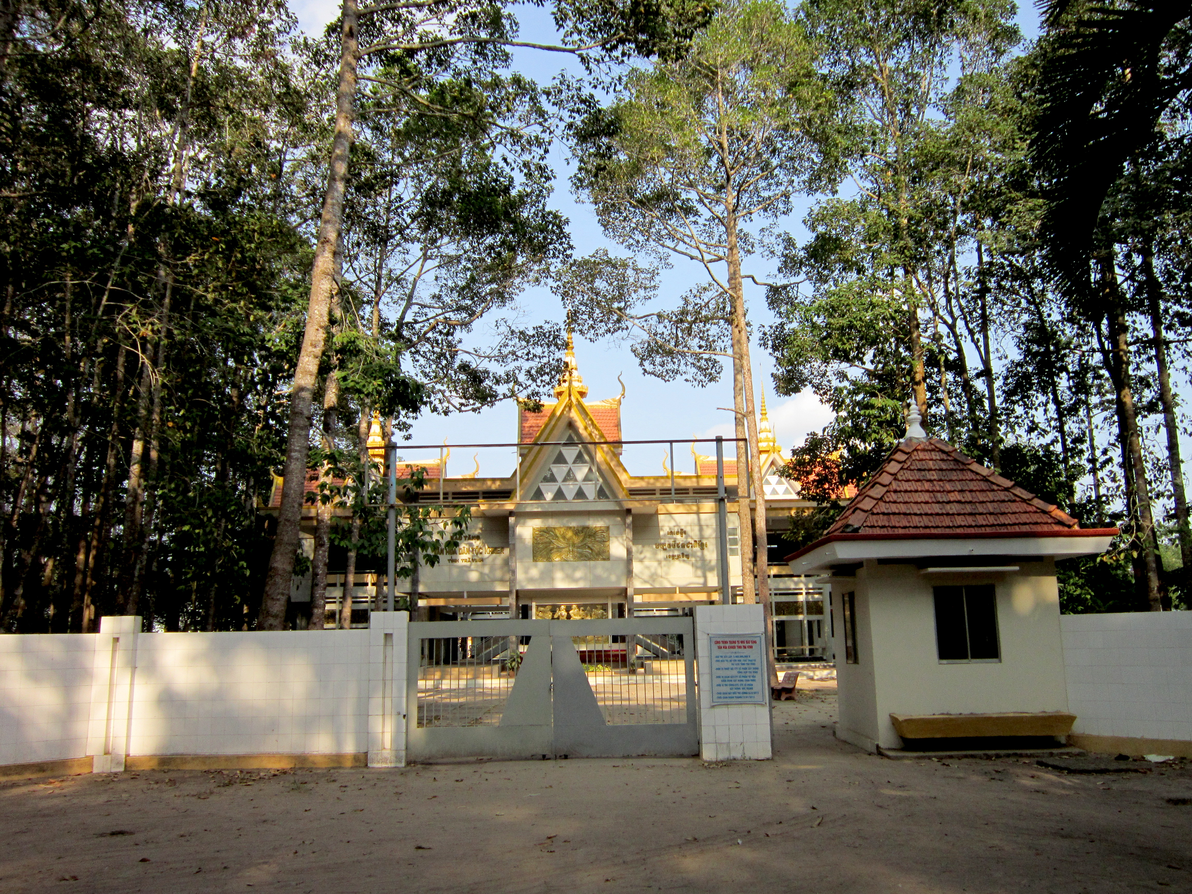 Bảo tàng văn hóa dân tộc Khmer tỉnh Trà Vinh nằm trong quần thể Khu di tích Ao Bà Om, Chùa Âng; hiện tọa lạc tại khóm 4, phường 8, thành phố Trà Vinh, tỉnh Trà Vinh, Việt Nam.